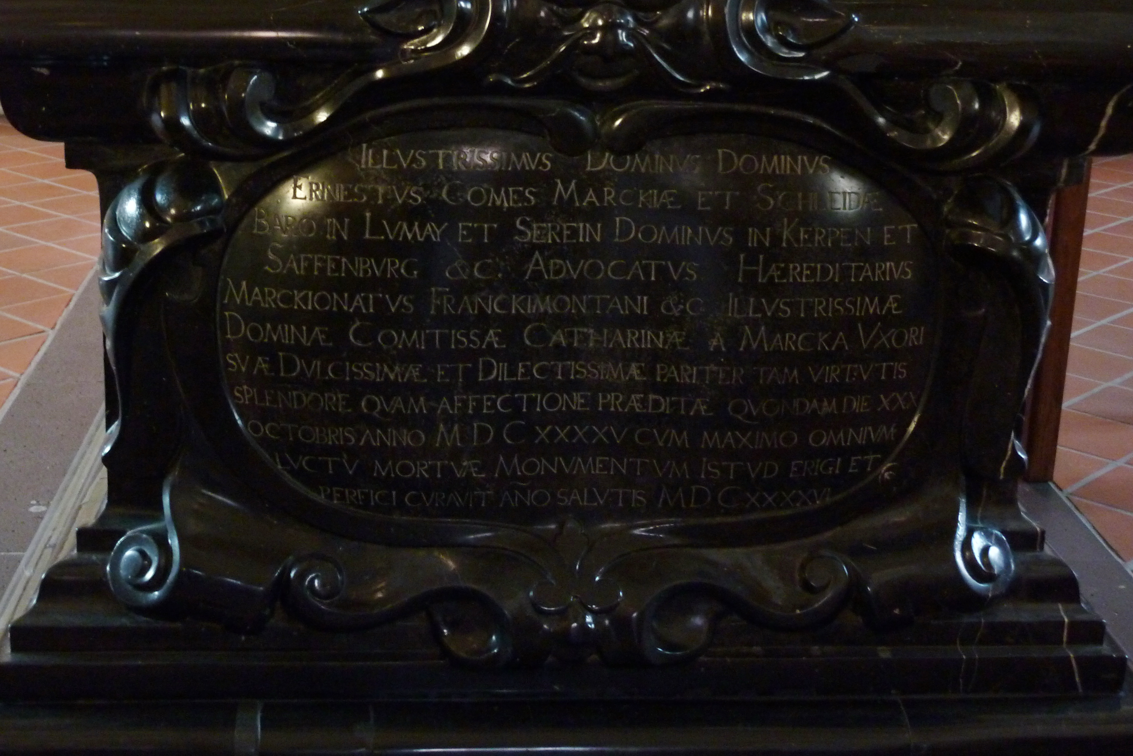 katholische Pfarrkirche St. Nikolaus und Rochus in Mayschoß, Grabmal der Katharina von der Mark